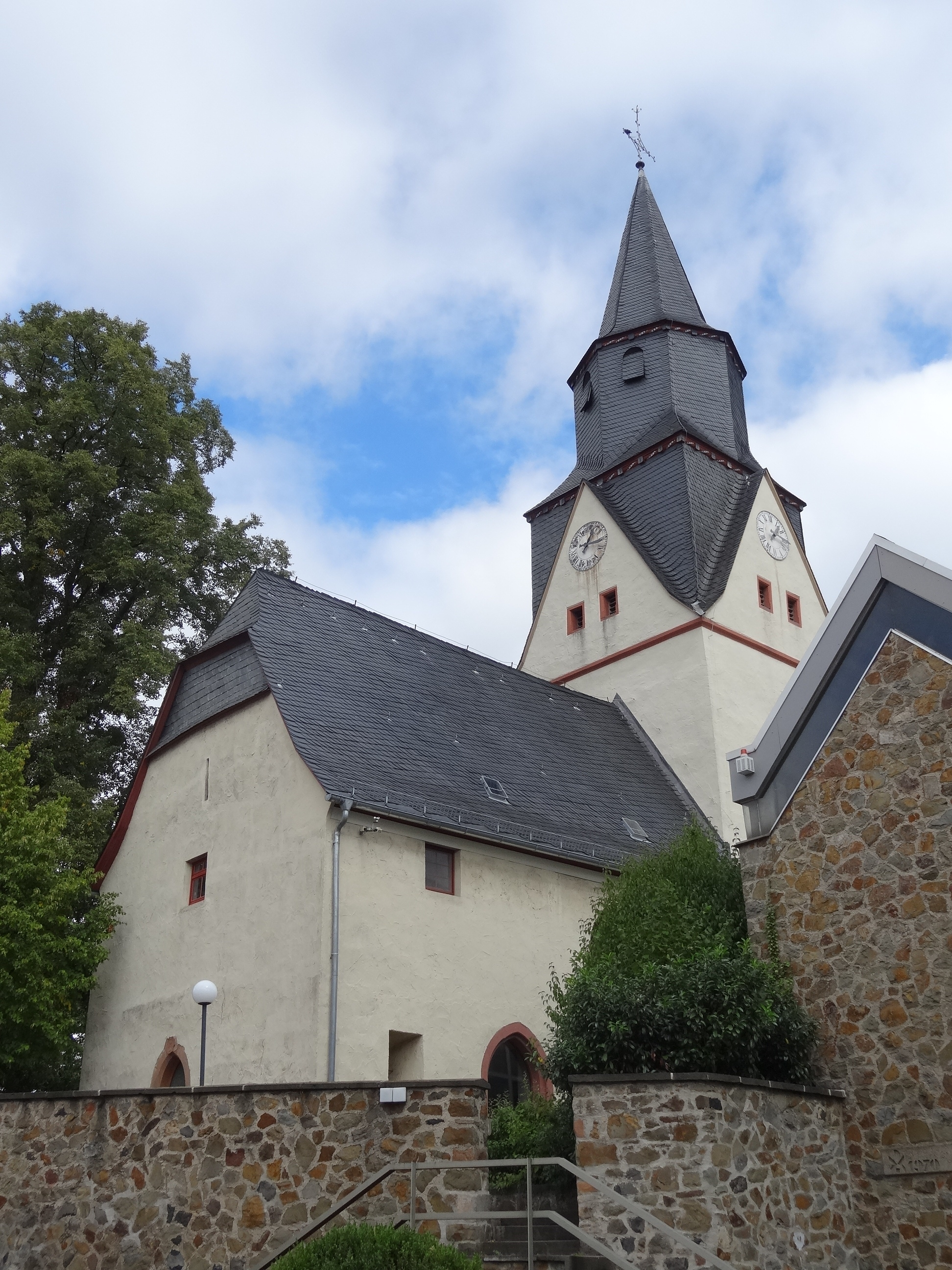 Evangelische Kirche (Heuchelheim, Hessen)